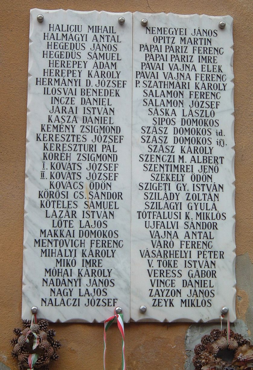 A Bethlen Kollégium híres tanárai és diákjai, emléktábla Nagyenyeden